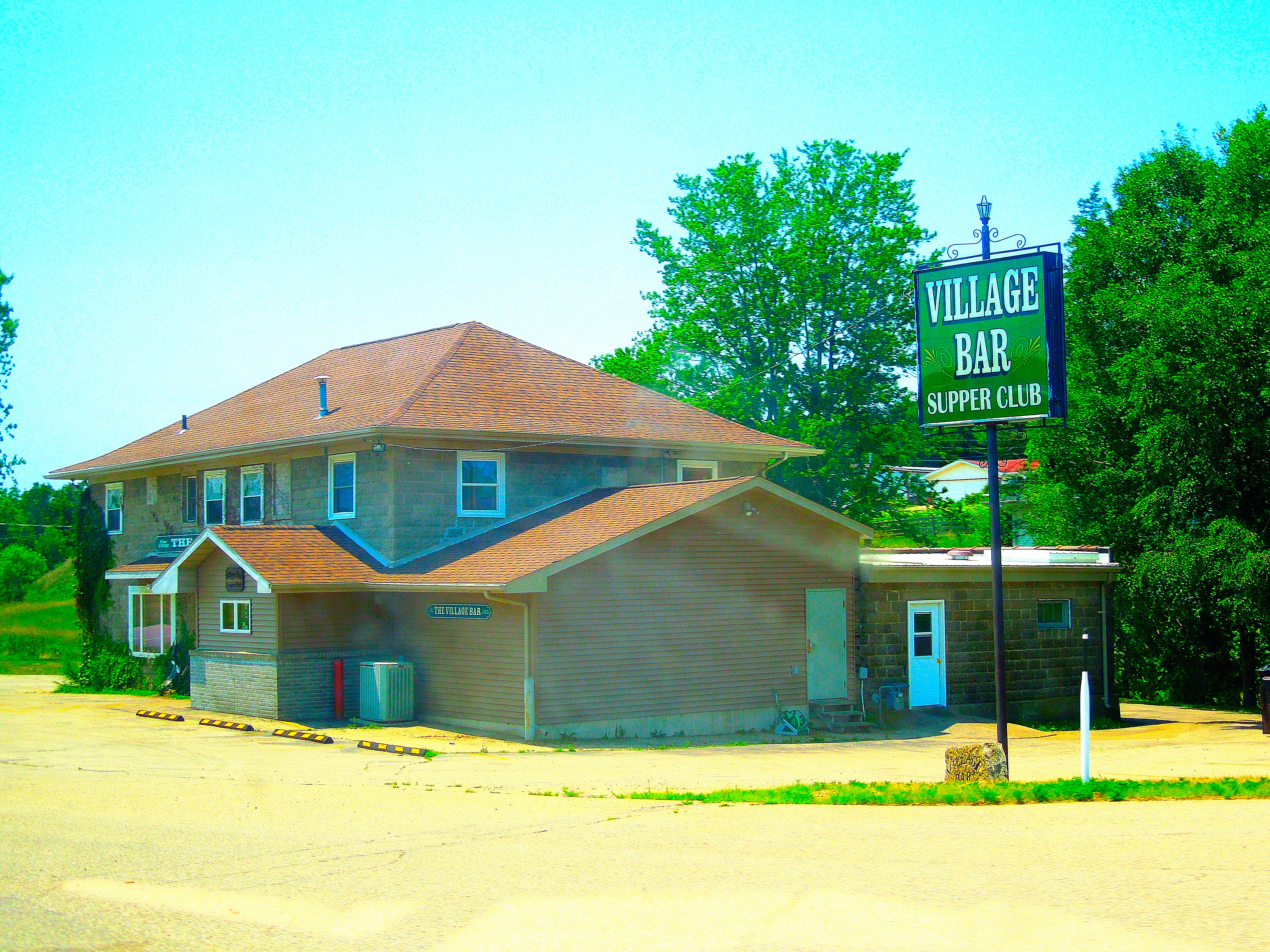 Village Bar Supper Club